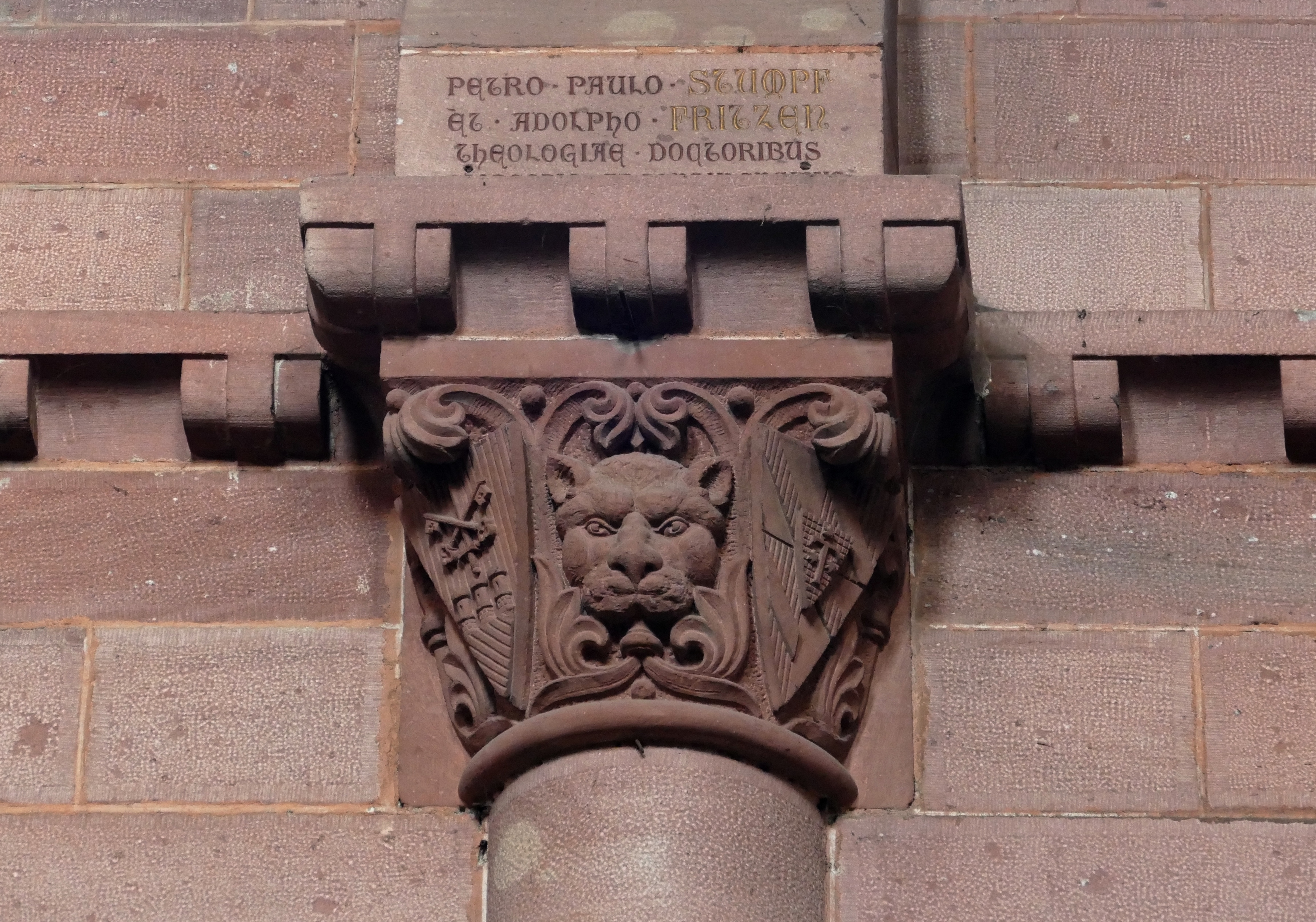 Alsace, Bas-Rhin, Sélestat, Église Sainte-Foy (PA00084981, IA00124586). Chapiteau néo-roman (1891) de la nef